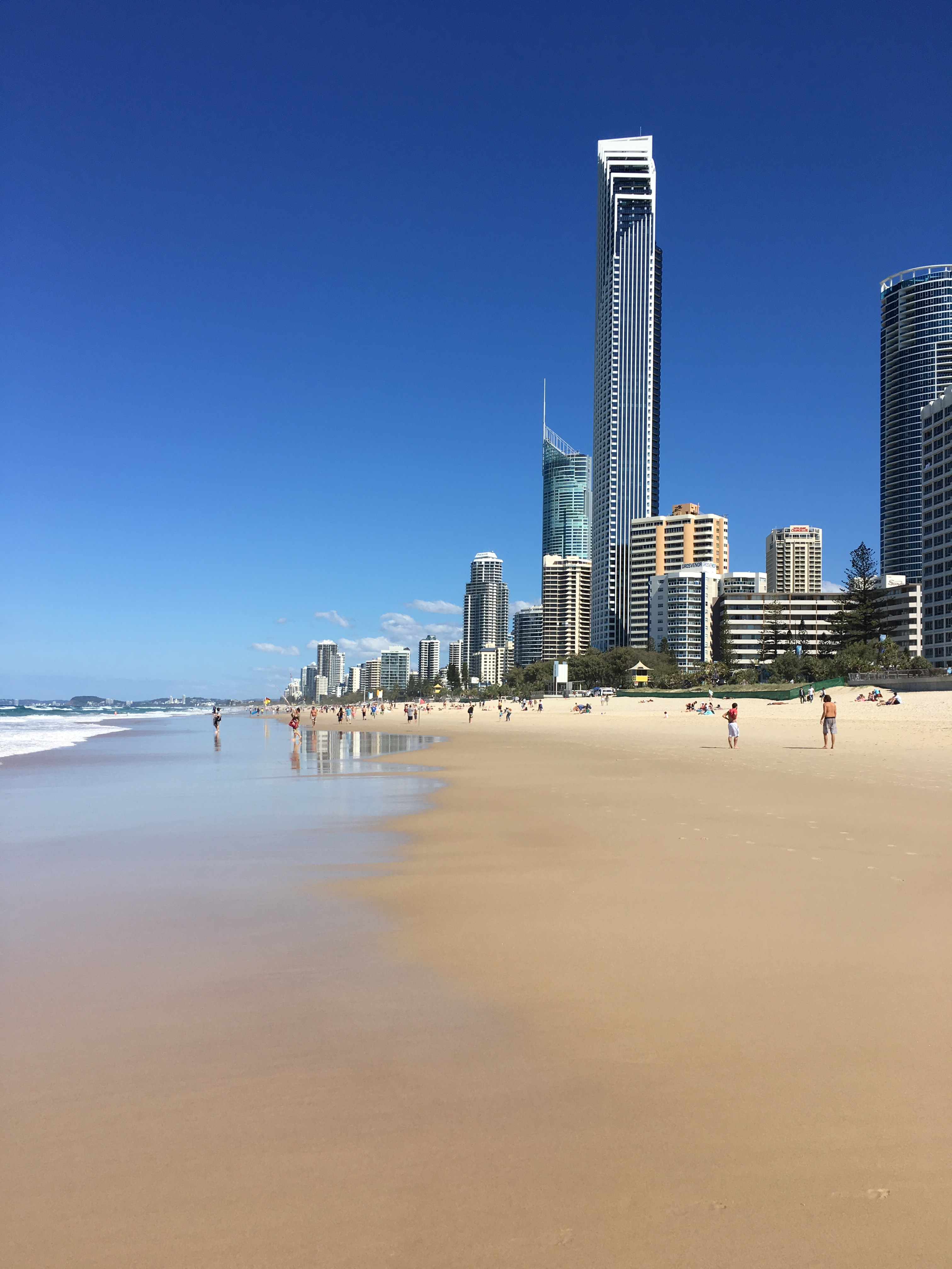 Skyline von Surfers Paradise vom Strand ausgesehen im August 2016.jpg